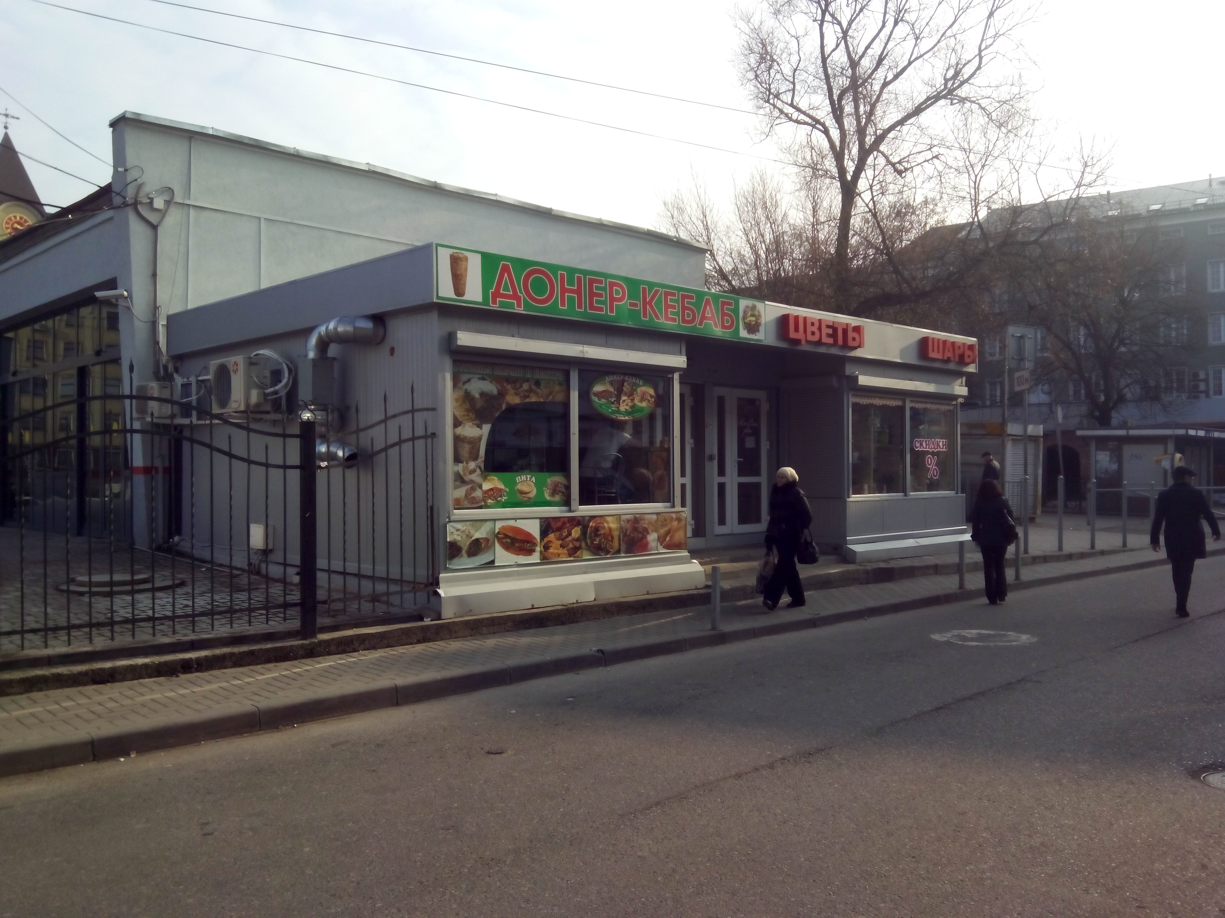 Донер-кебаб в г. Калининград, Россия